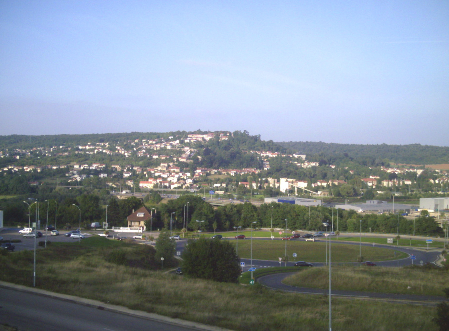 Bouxières-aux-Dames depuis la zac de Frouard